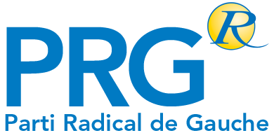 Logo der Parti radical de gauche